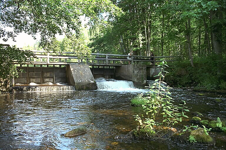 Damm. Motiv: Engelsbergs bruk Nyckelord: Byggnadsminnen, Industriminnen, Riksintressen, Världsarv Kategori: Bruksmiljö Damm.